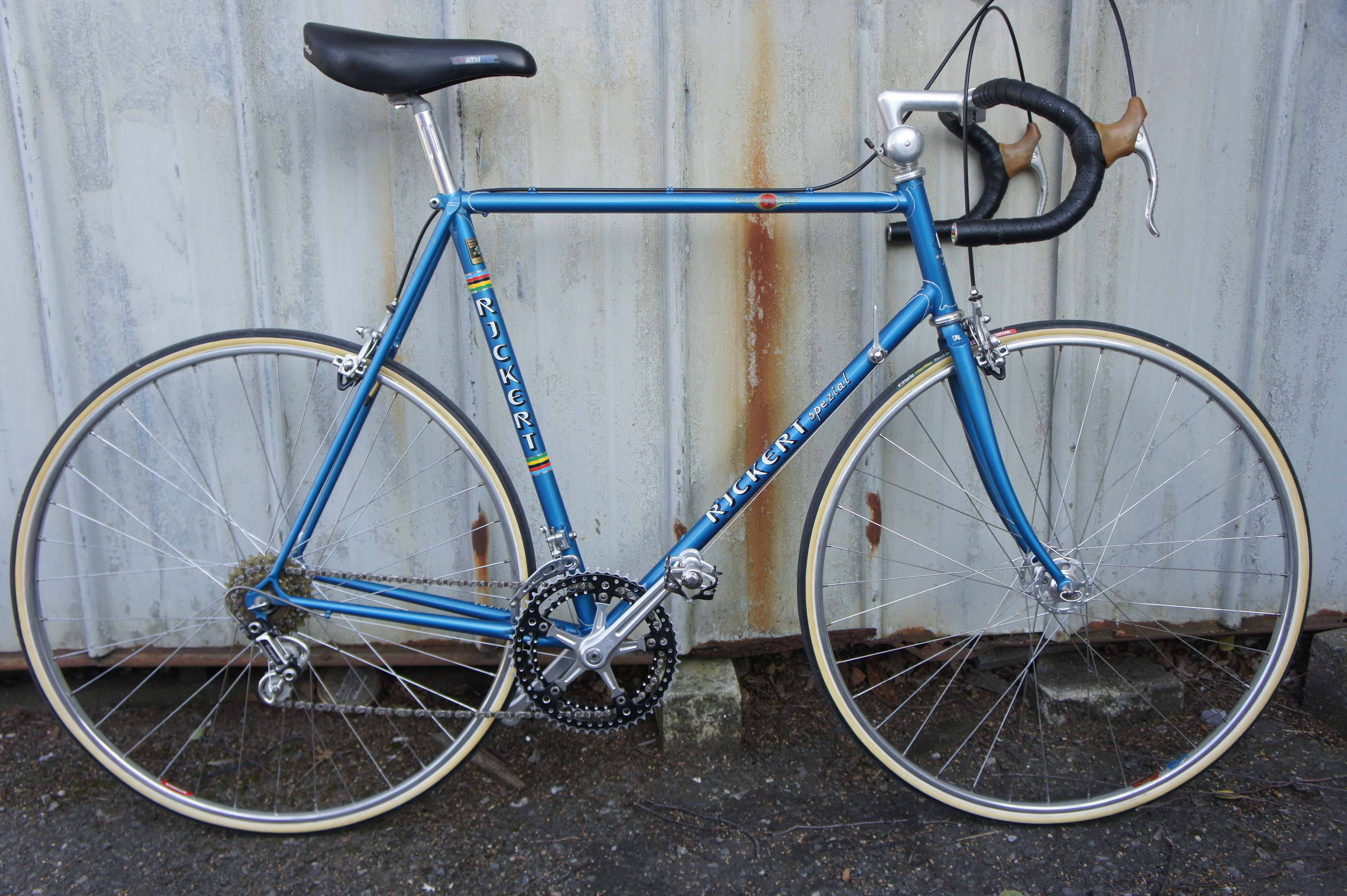 Rennrad, gebaut von Hugo Rickert 1980, Modell Campa, aus Privatsammlung